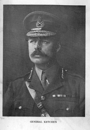 Huntly Ketchen - Project Gutenberg eText 18963 - better images at File:Huntly Ketchen - Project Gutenberg eText 18963 a.jpg